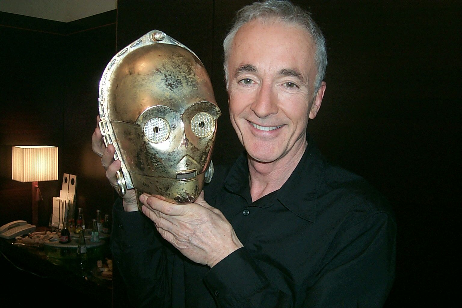 Anthony Daniels im Jahre 2005